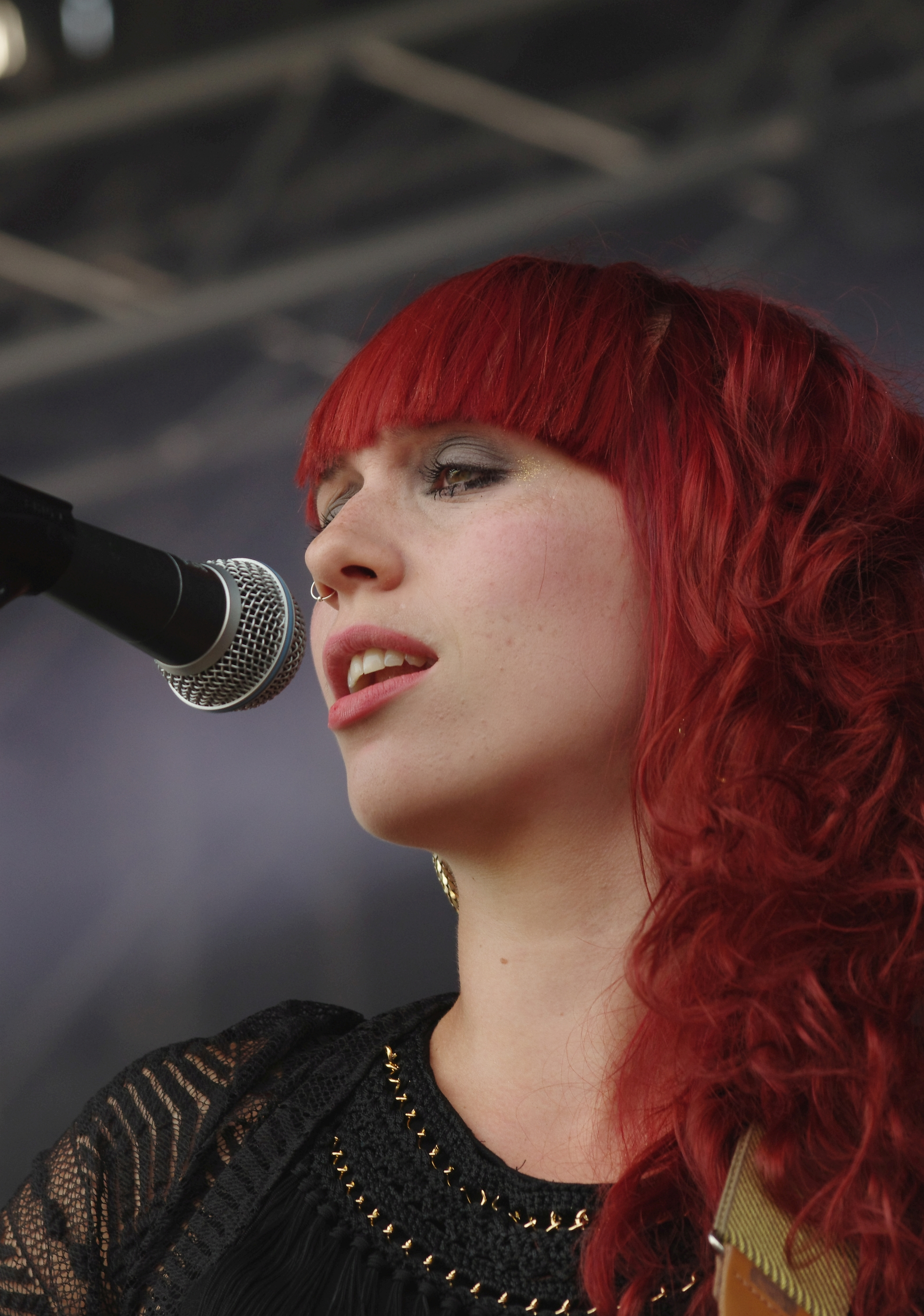 JJ Rosa beim Krach Am Bach in Beelen, 2013